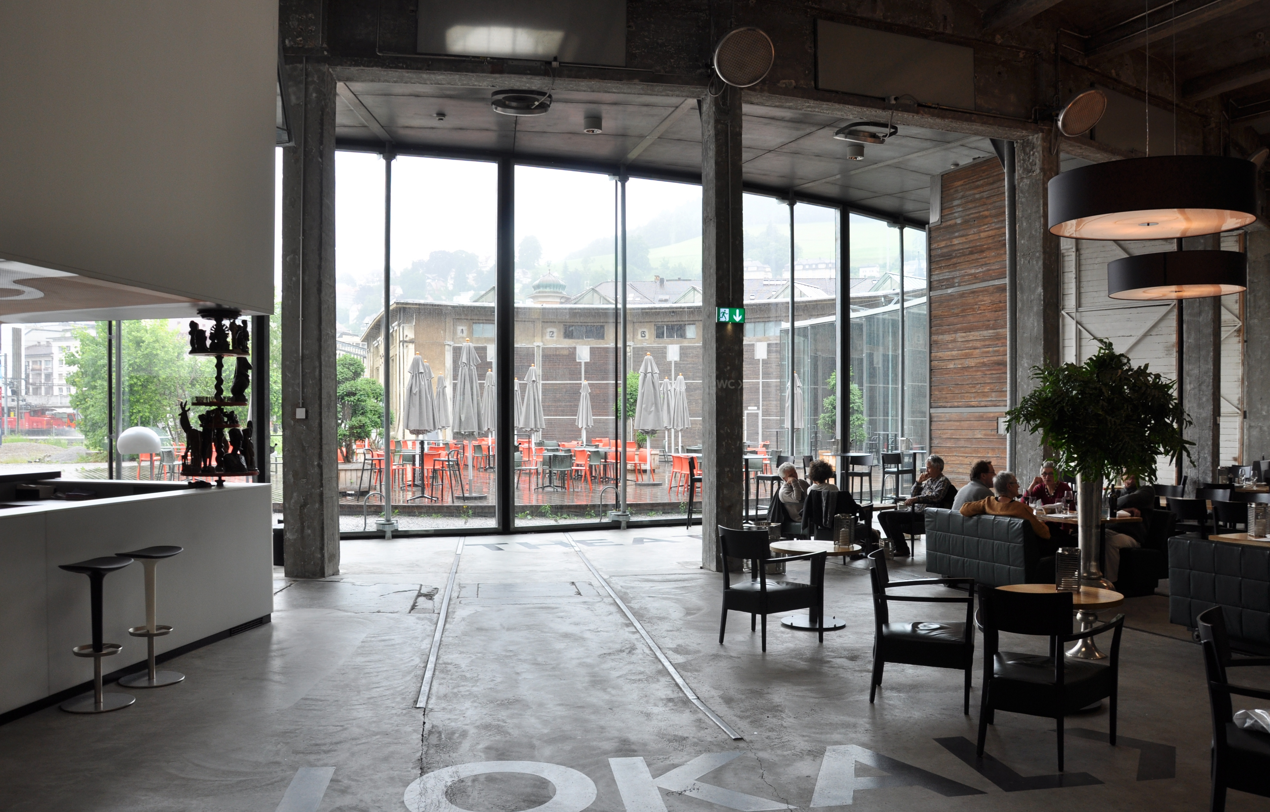 St. Gallen, Lokremise, Restaurant